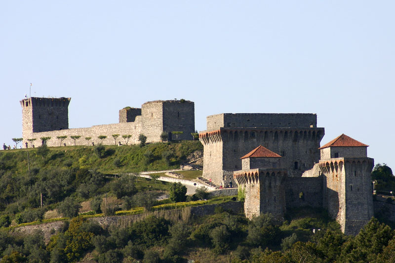 Castle of Ourém, Portugal